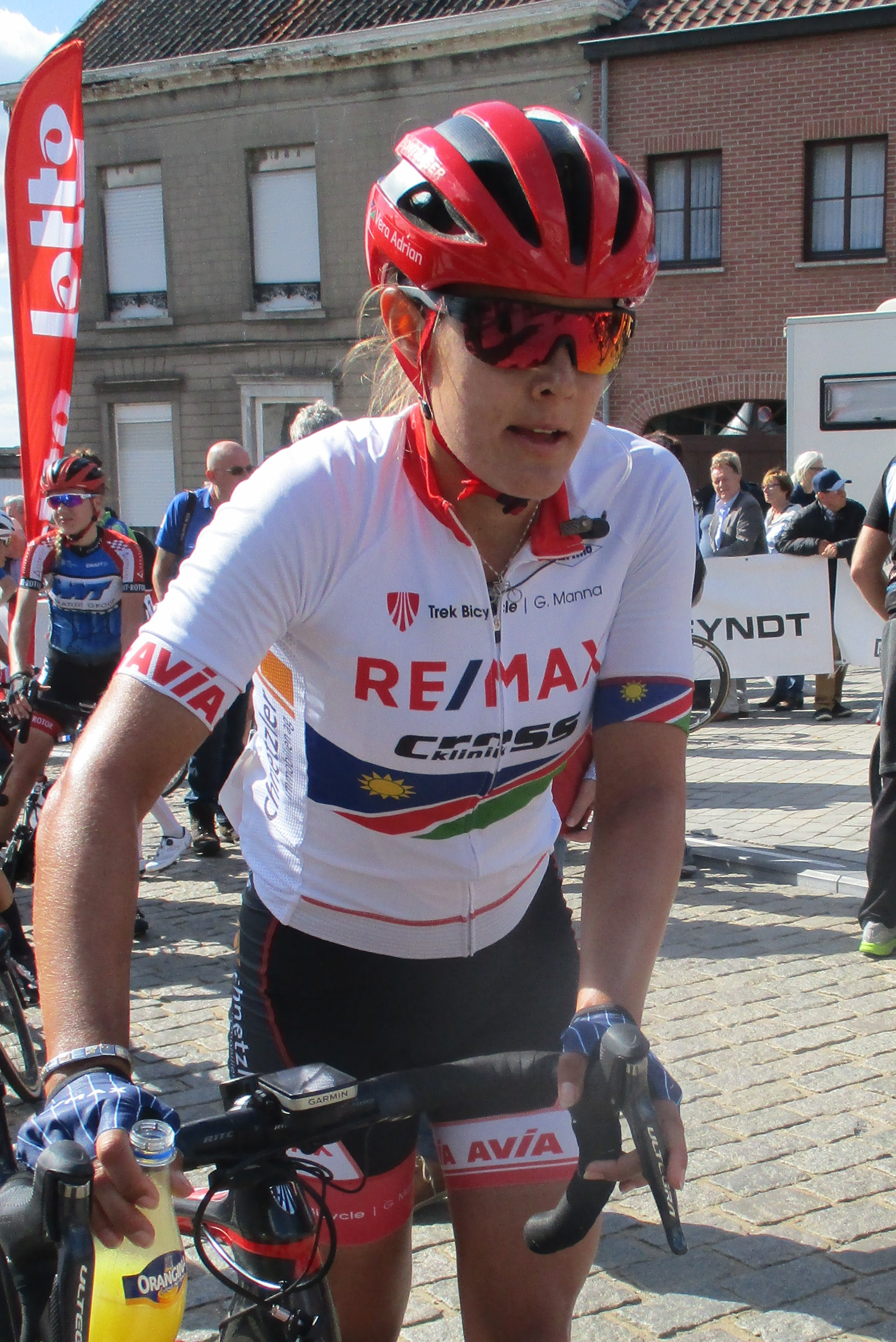 Vera Adrian (Re/Max) in Geraardsbergen na de laatste etappe van de Lotto Belgium Tour 2018